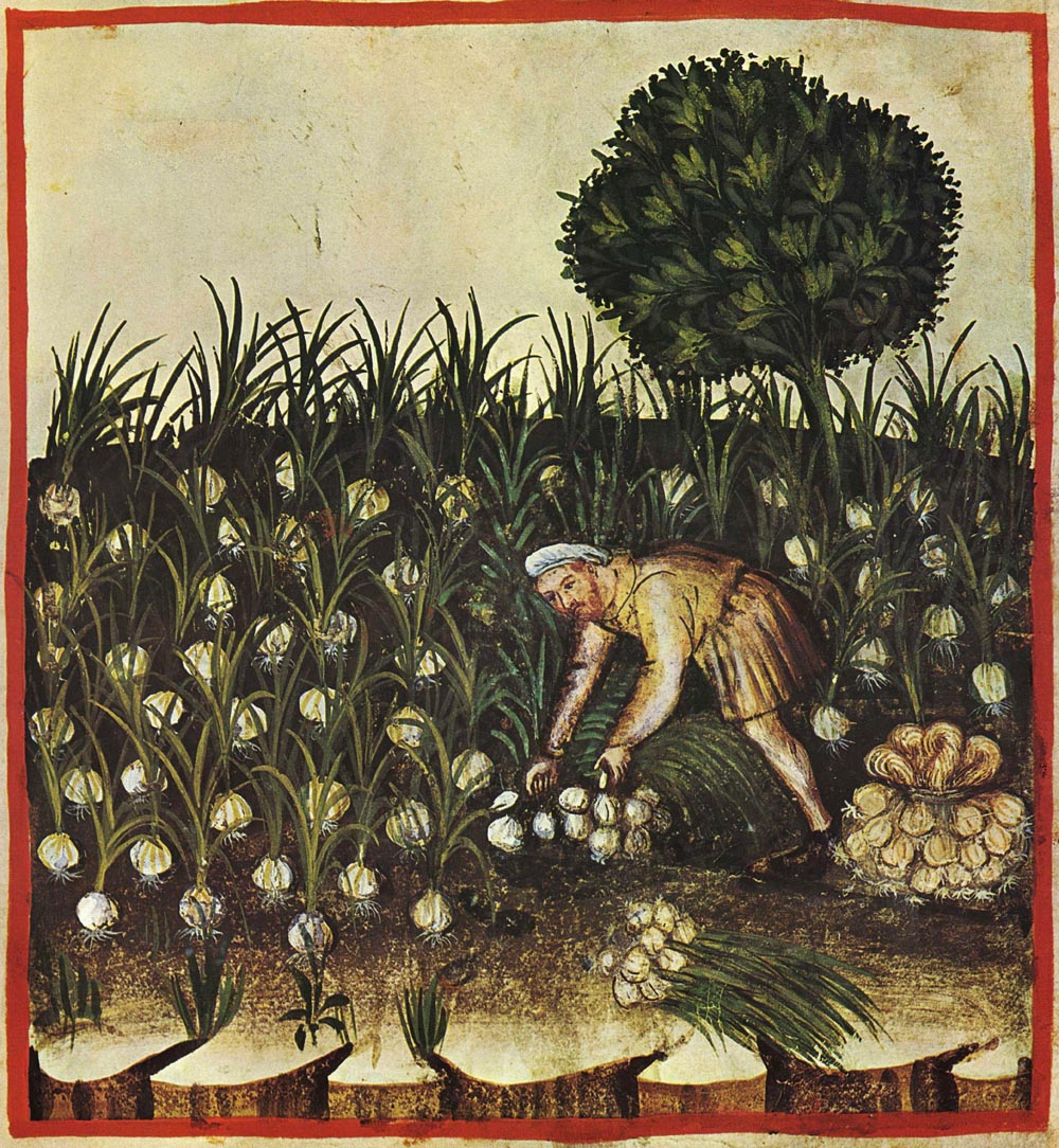 Tacuina sanitatis (XIV century)